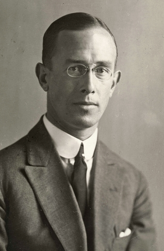 portrett, mann, professor, dr. med., brystbilde, lorgnetter.